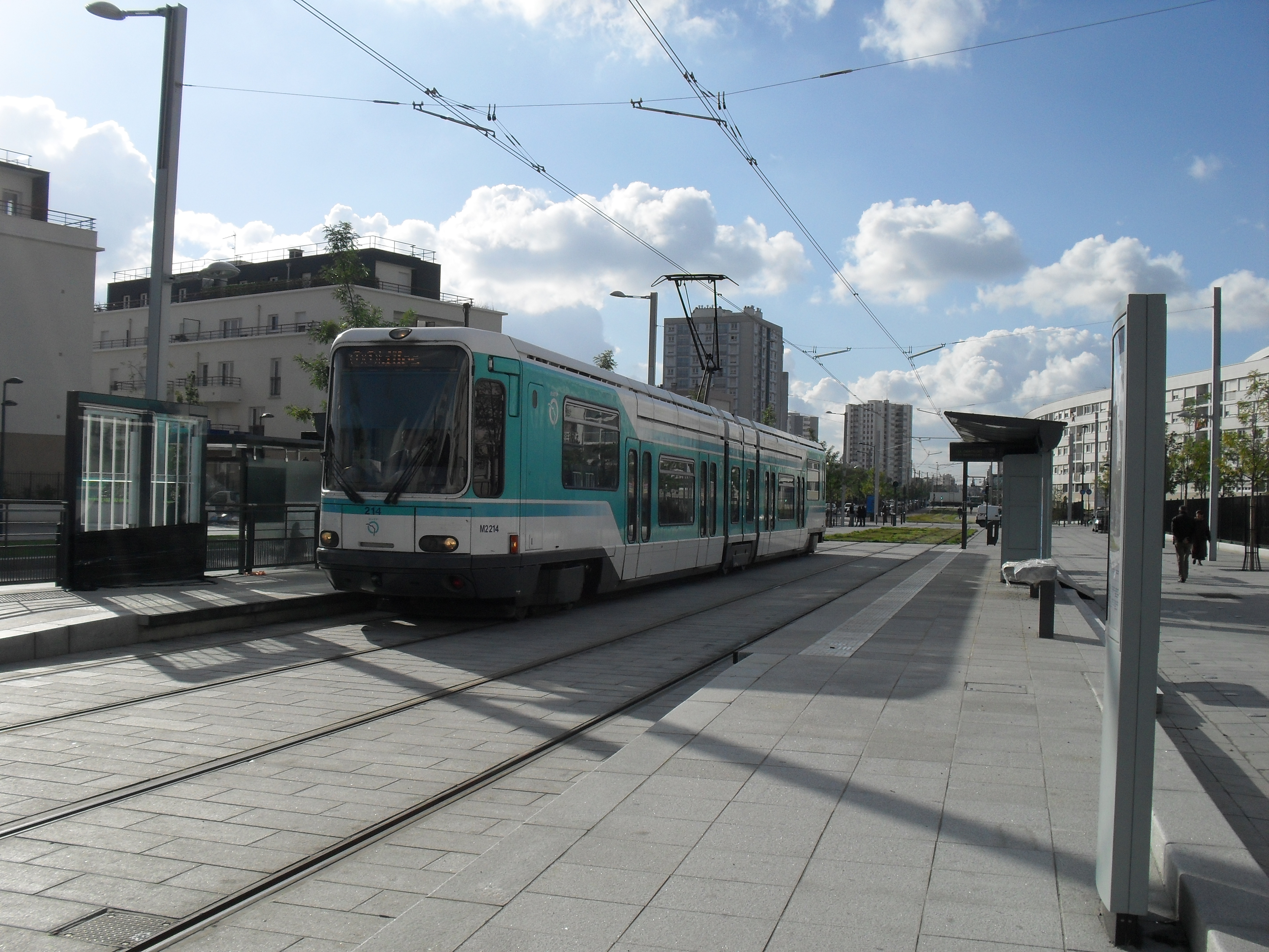 Paris Tramway ligne 1